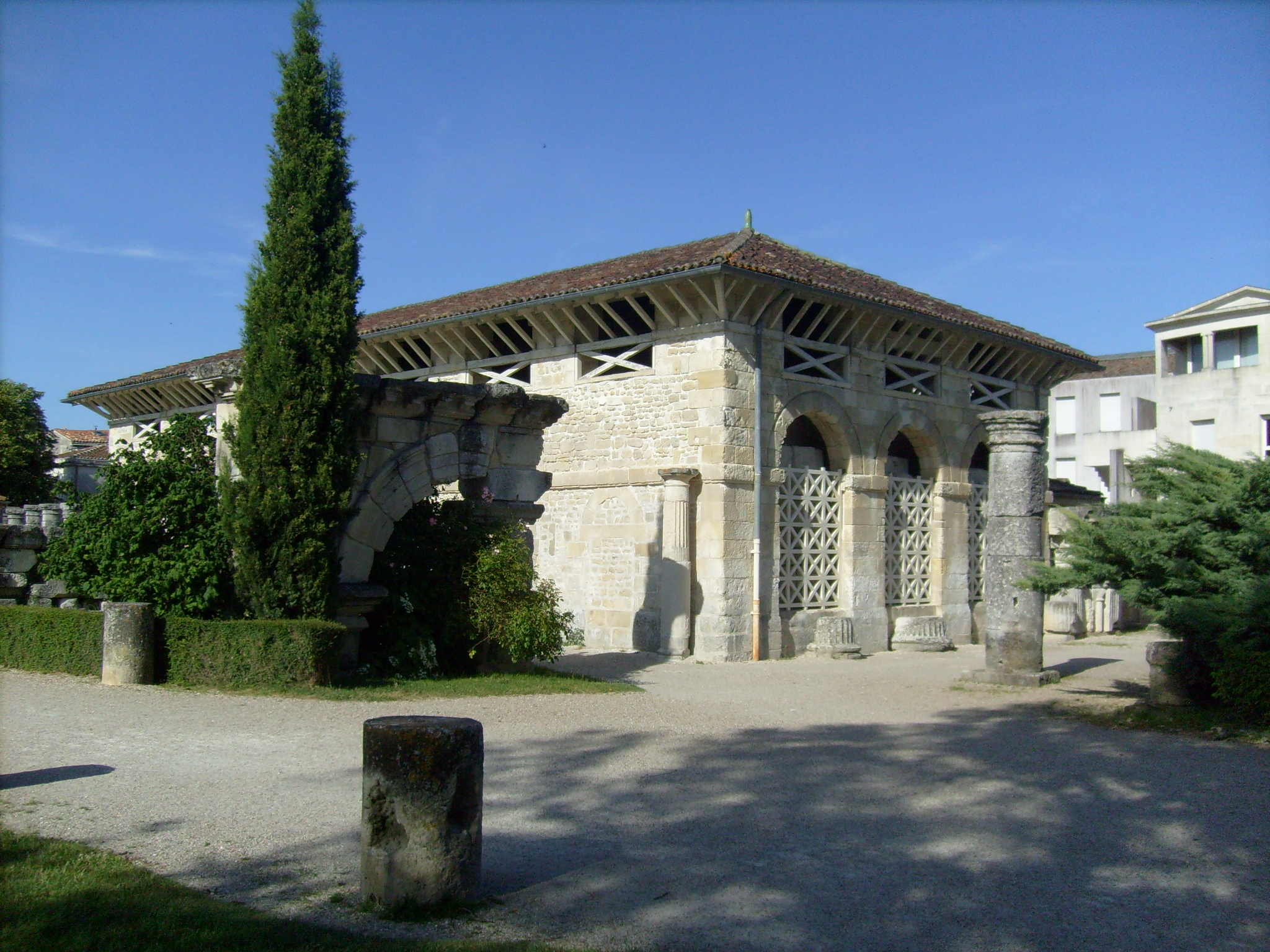 Le musée archéologique de Saintes